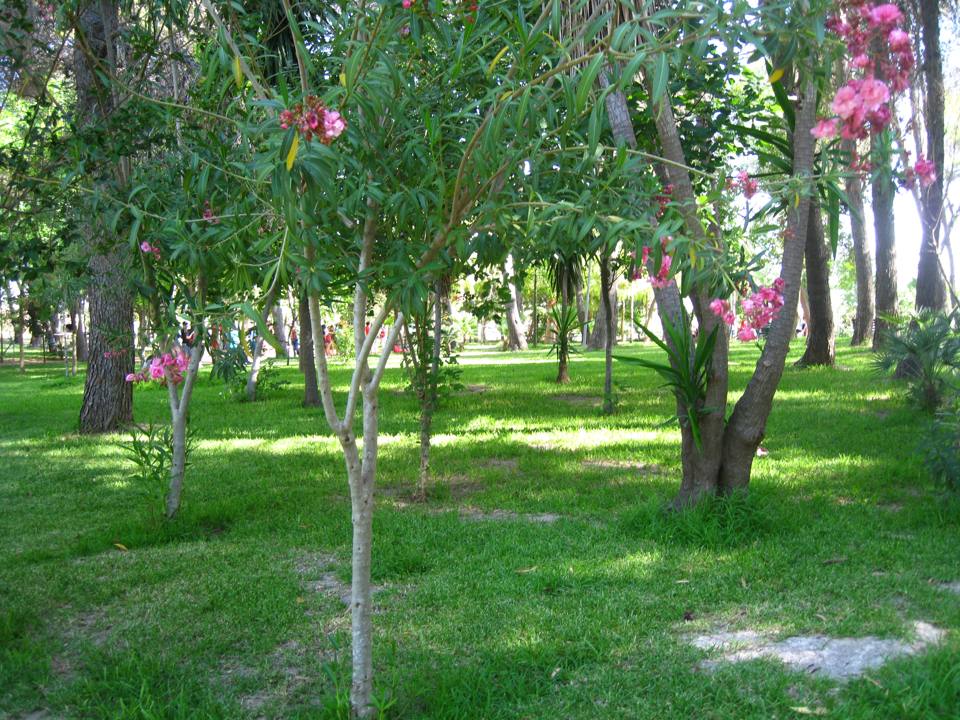 Vista del interior del parque de Guadalema de los Quintero (Sevilla, España)